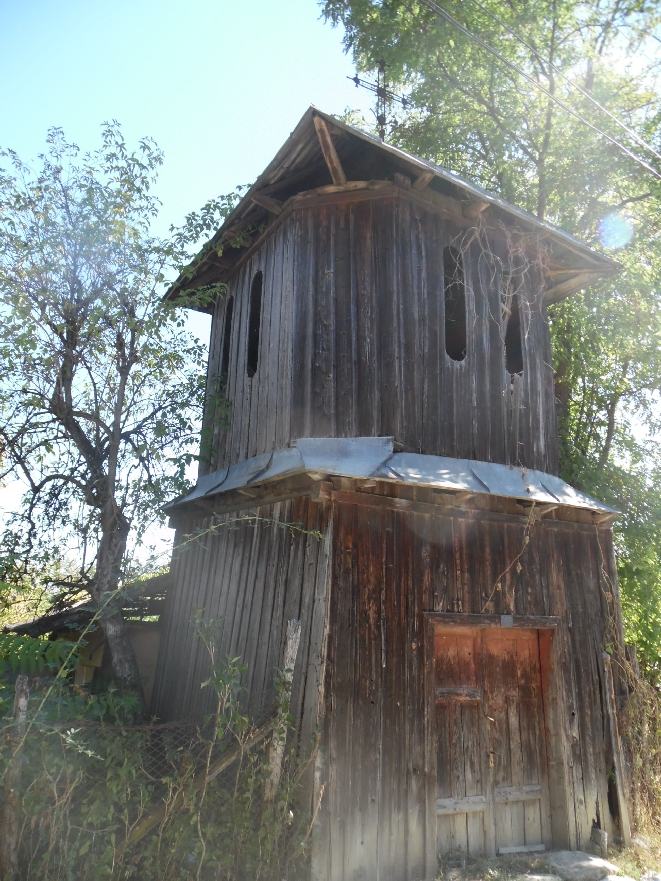 Fosta Biserica Chiojdeanca